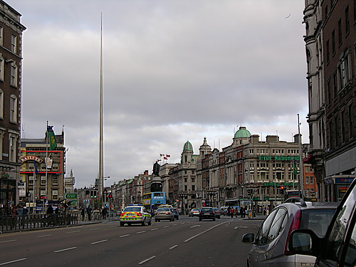 O'Connell bridge y O'Conell street desde Westmoreland street. Puede apreciarse el Spire, escultura metálica de 120 metros de altura.